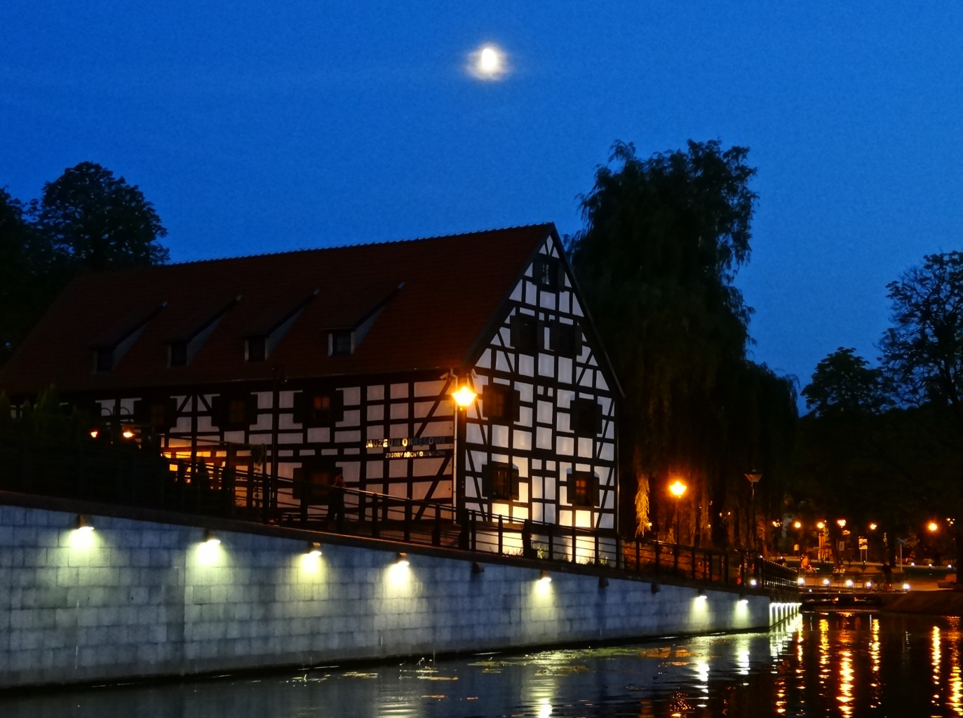 Biały Spichlerz na Wyspie Młyńskiej w Bydgoszczy, zbud. ok. 1790 r. na gotyckich piwnicach z XV-XVI w.